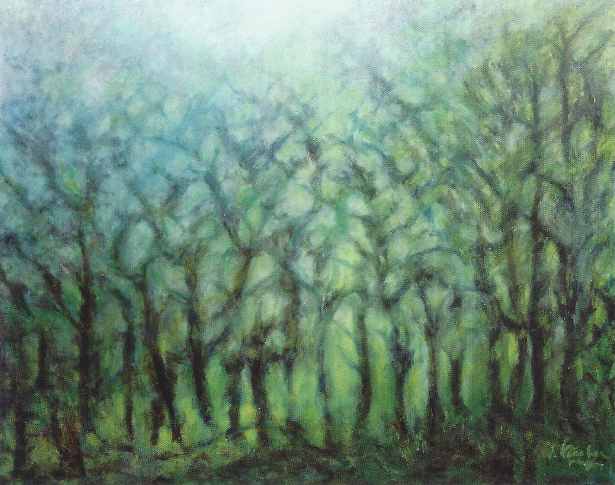 „Wattlandschaft“, Öl auf Leinen